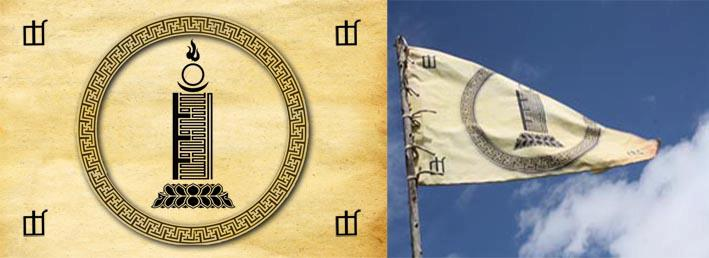 Монгол: Цагаагчууд овгийн туг